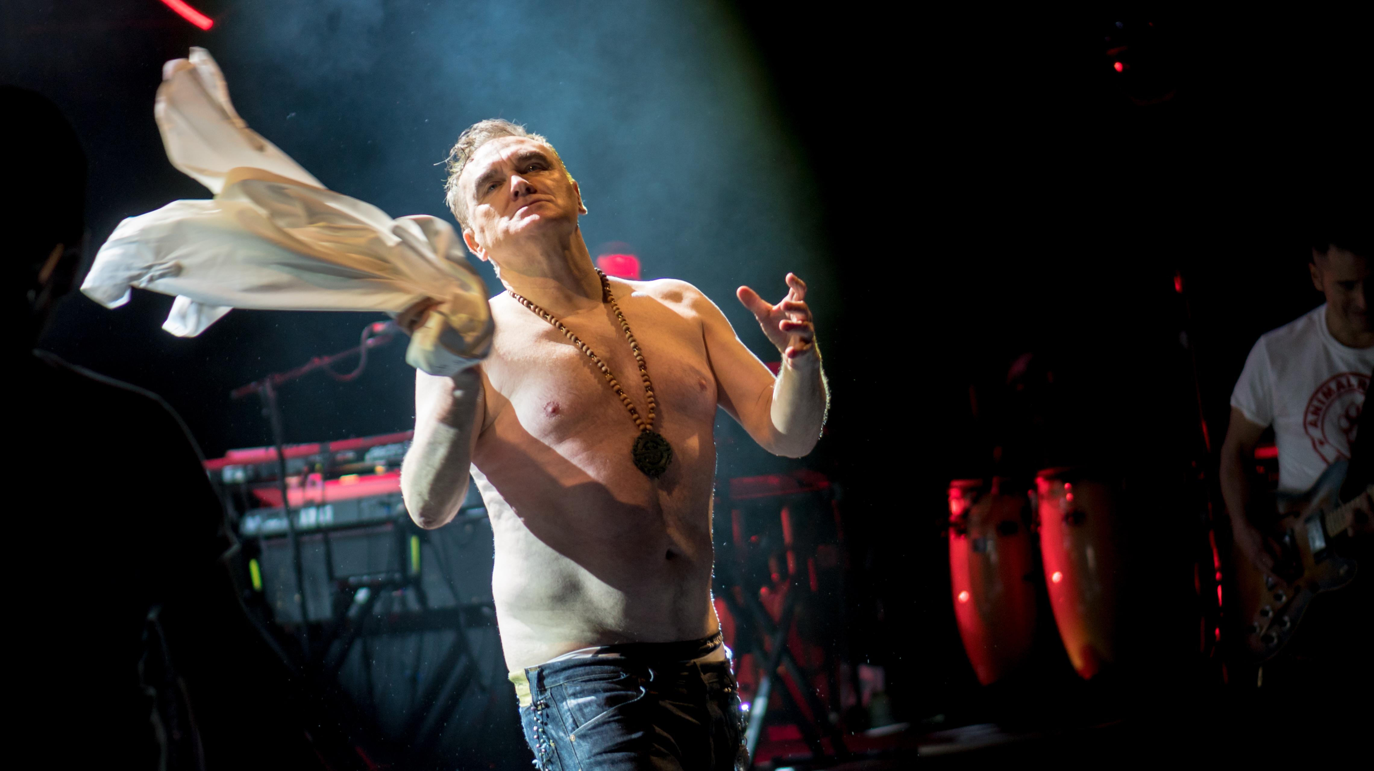 MozRAH070318-45